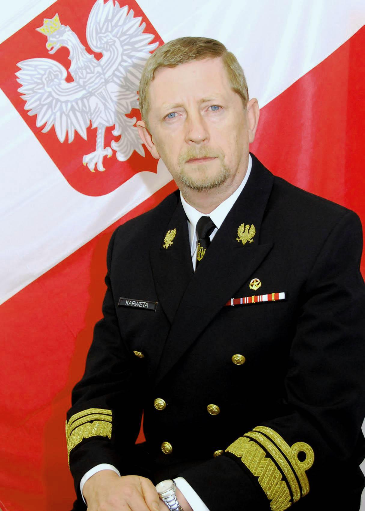 wiceadmirał Andrzej Karweta